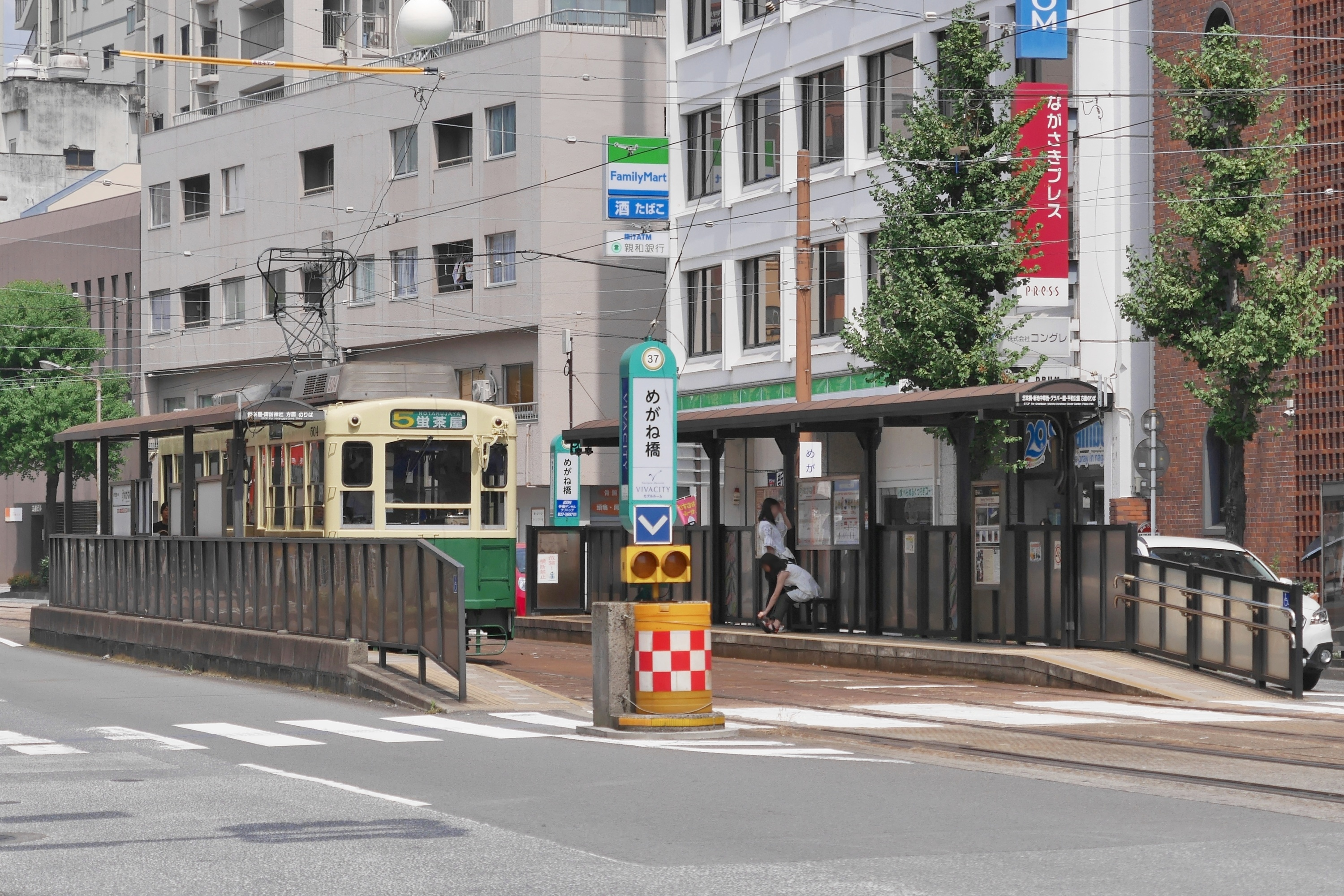 長崎電気軌道の「めがね橋」停留所（長崎県長崎市）。